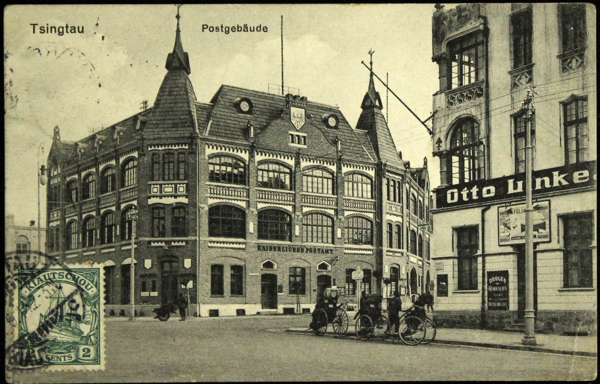 青岛胶澳皇家邮局